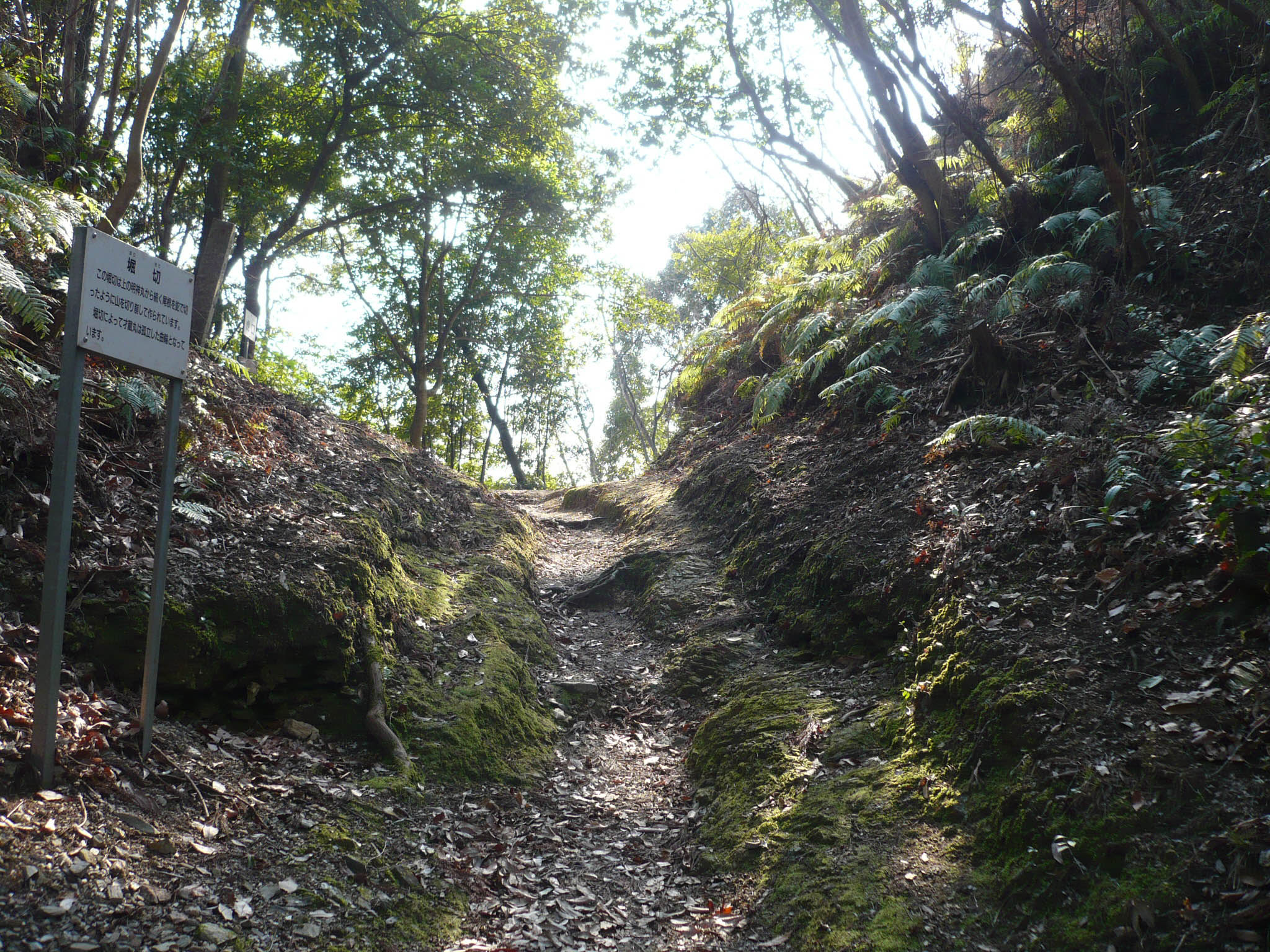 堀切跡